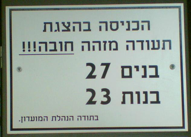 שלט המורה על הגבלת גיל, בכניסה למועדון במתחם יד חרוצים בתל אביב